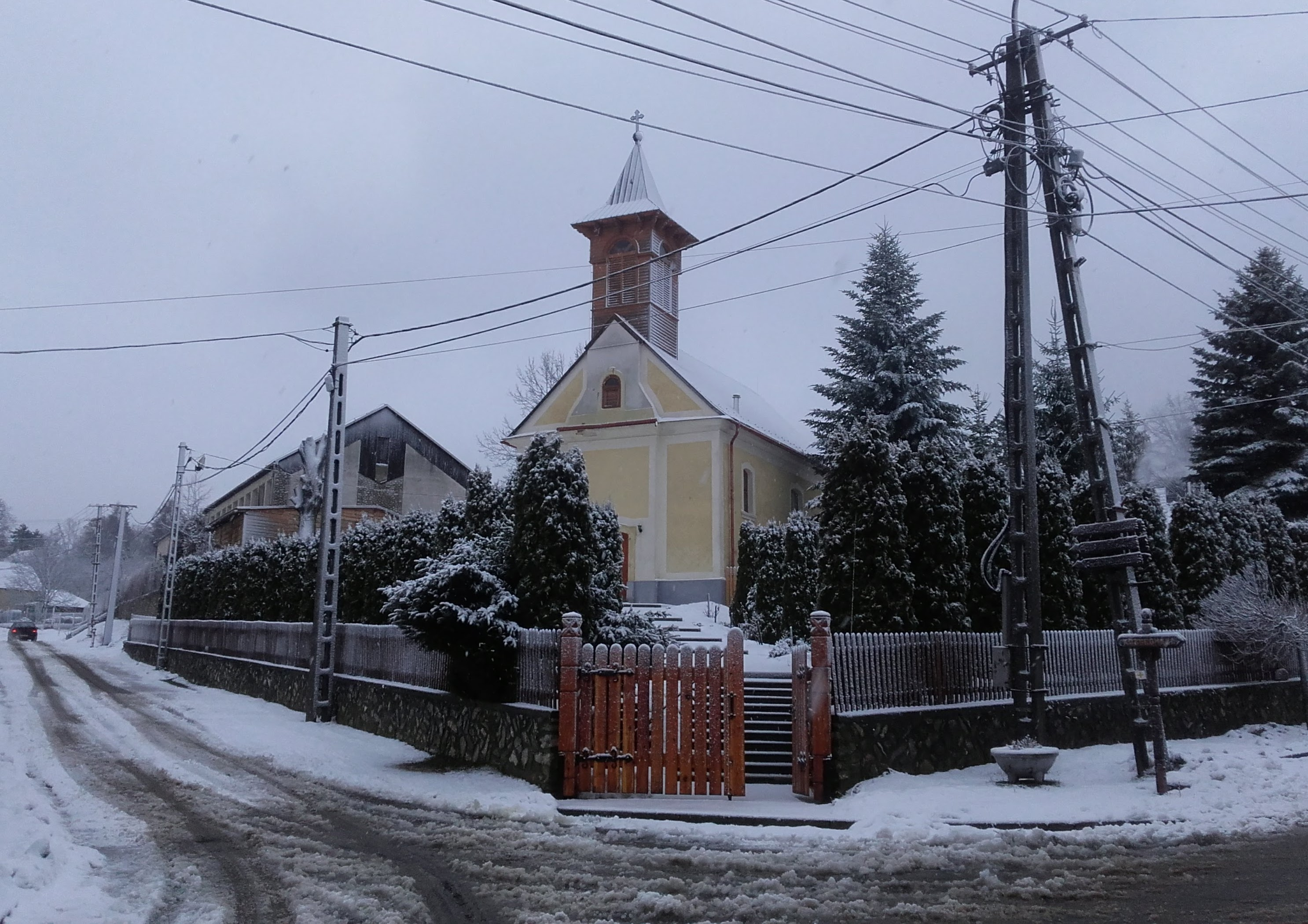 A bükkszentkereszti barokk római katolikus templom 2017 decemberében